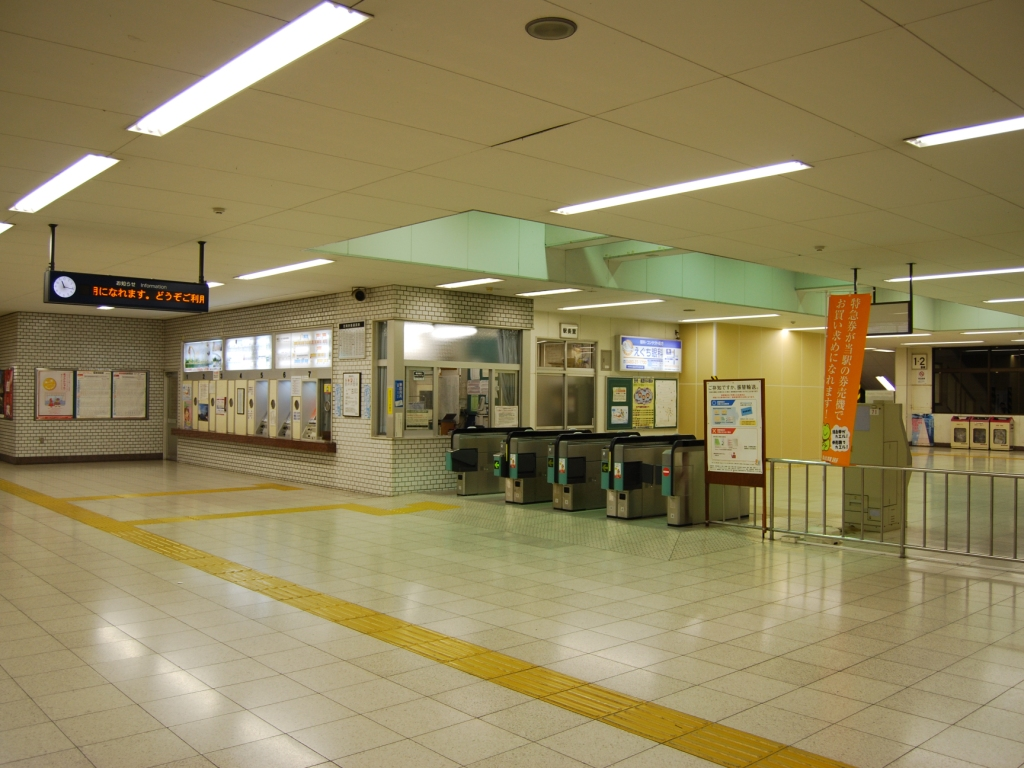 東武鉄道日光線杉戸高野台駅改札口及び自動券売機コーナー（2008/11/15撮影）